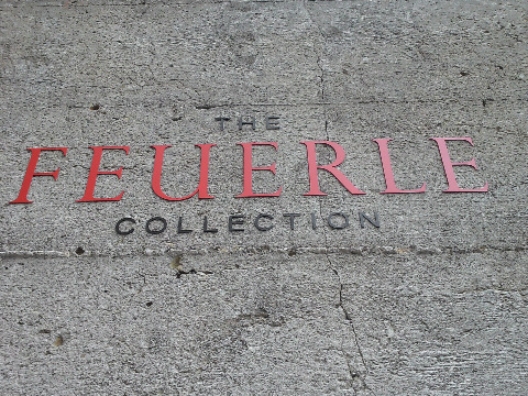 BASA-Bunker Berlin. An der Bunkerwand angebrachter Hinweis auf Neubesitzer und Nutzung für Kunstsammlung („Feuerle Collection“).